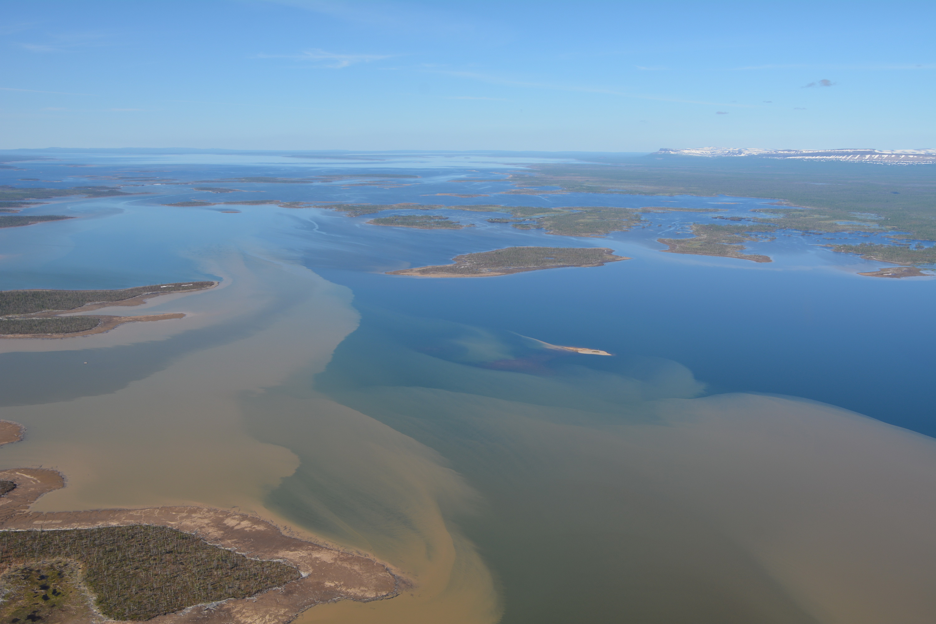 паводок на Хантайском водохранилище